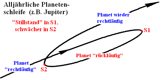 Jährliche Planetenschleife am Himmel